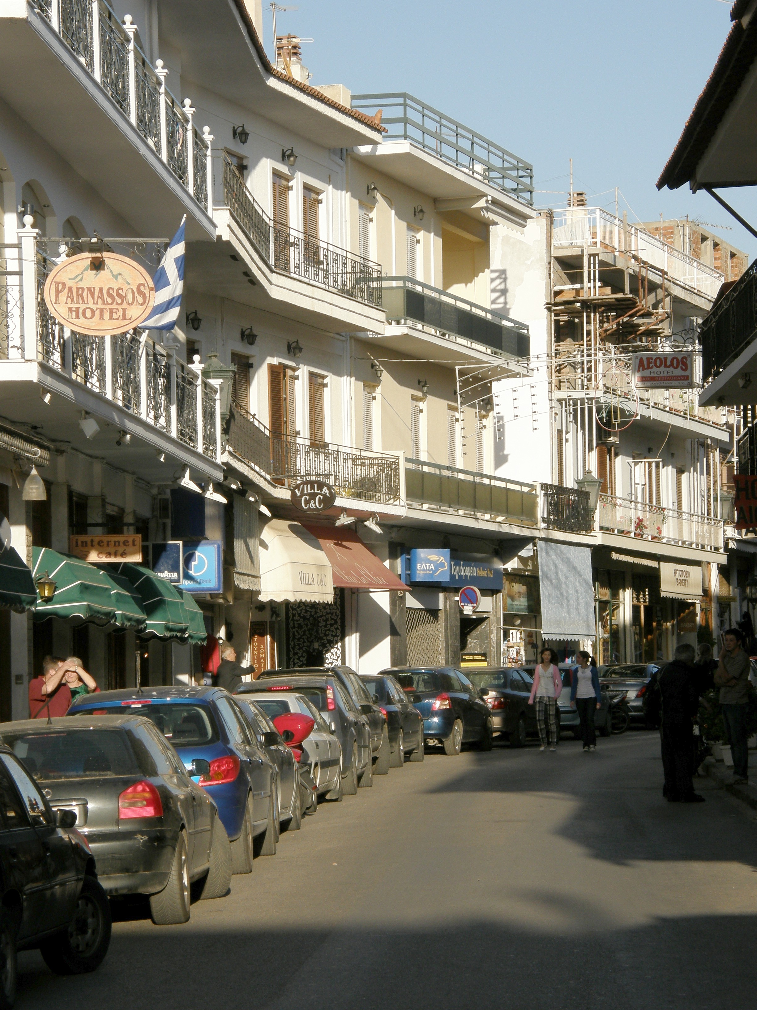 Hauptstrasse (2)